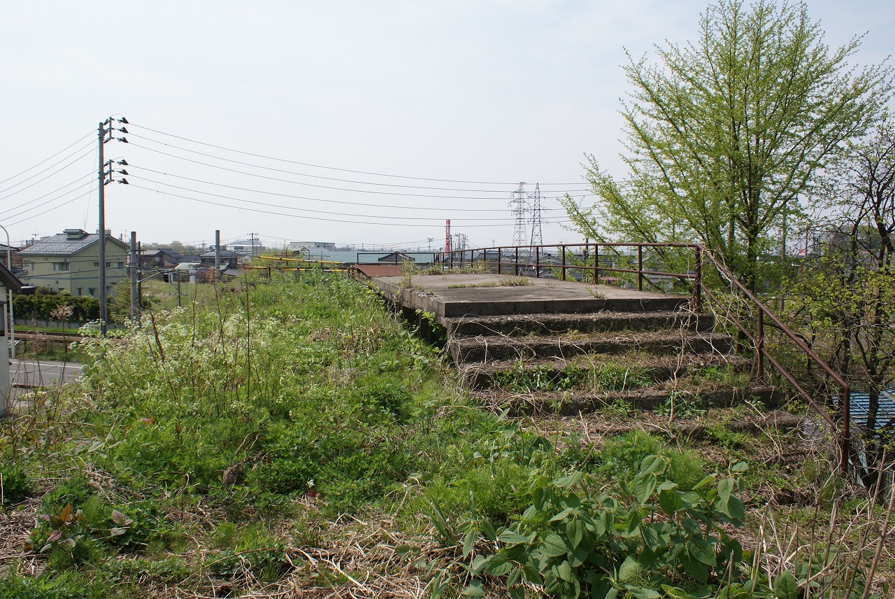 蒲原鉄道陣ヶ峰駅跡。2008年4月23日撮影。